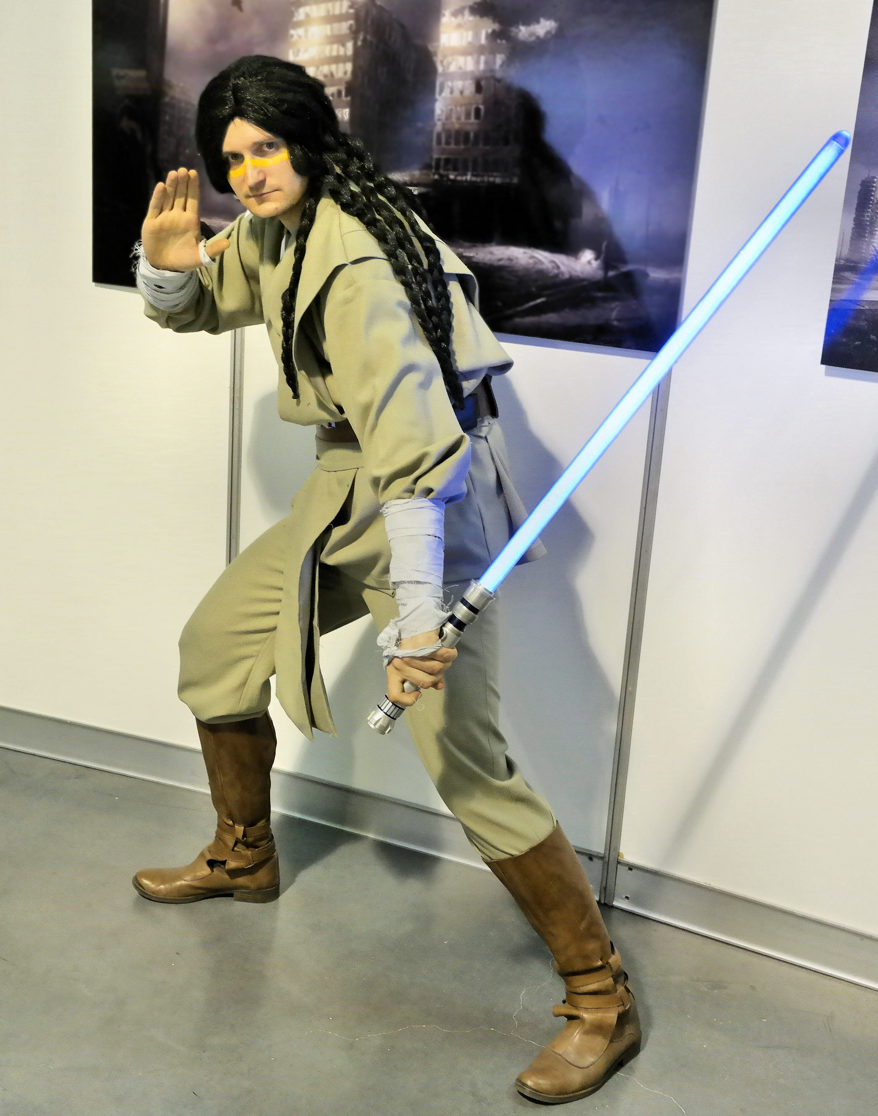 Cosplay: Quinlan Vos, fikcyjna postać ze świata Gwiezdnych Wojen, Pyrkon 2016, Poznań.